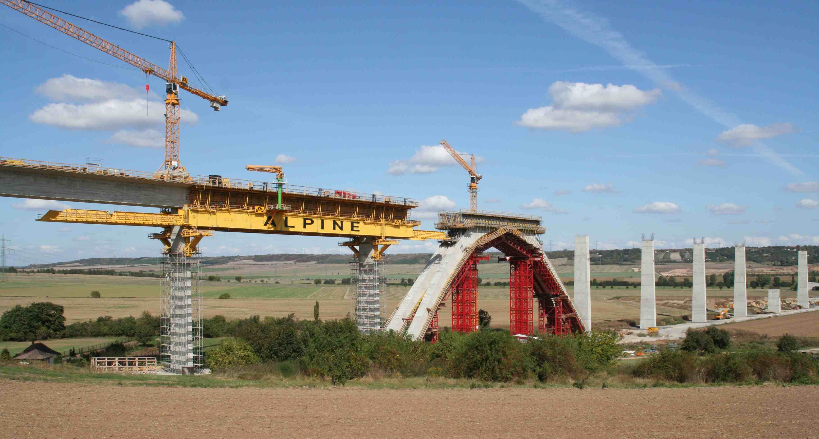 Unstruttalbrücke bei Karsdorf in Sachsen-Anhalt